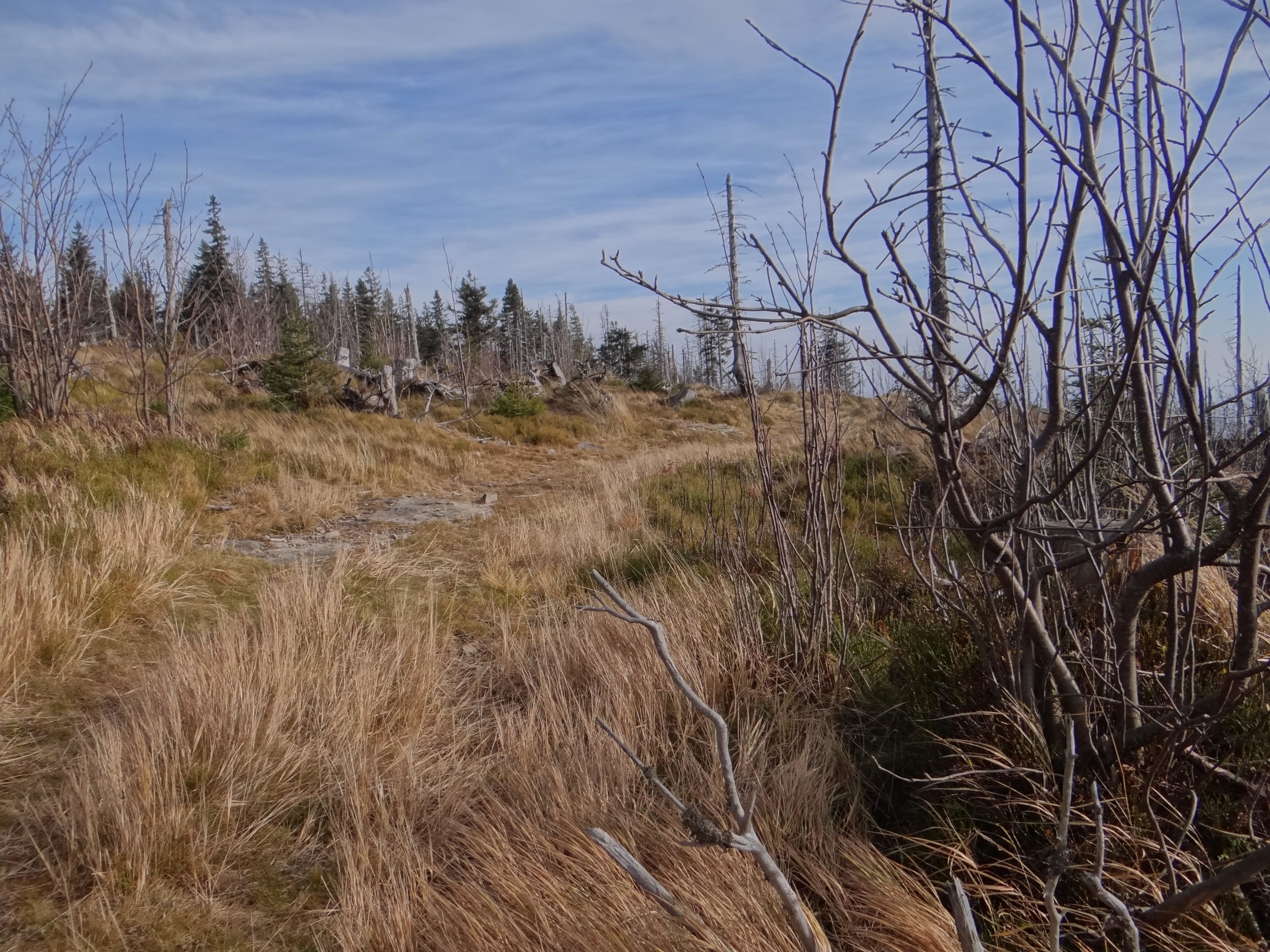 Rezerwat przyrody na Policy